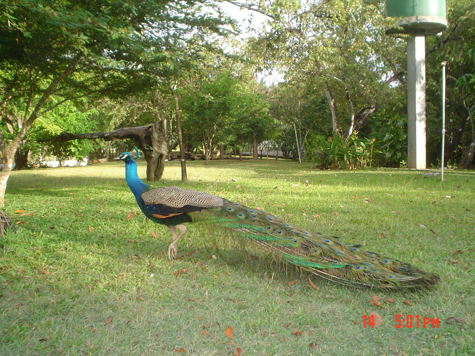 Pavo cristatus